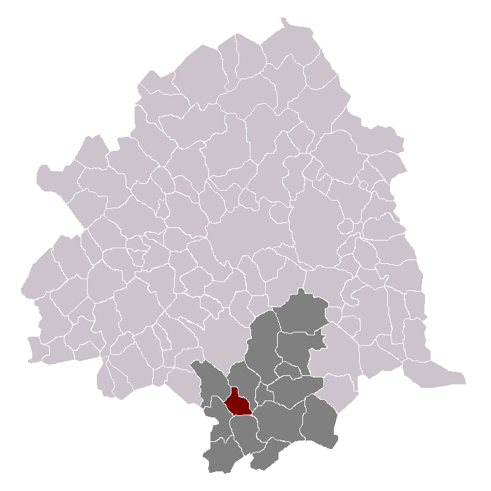 La Neuville dans son canton et son arrondissement